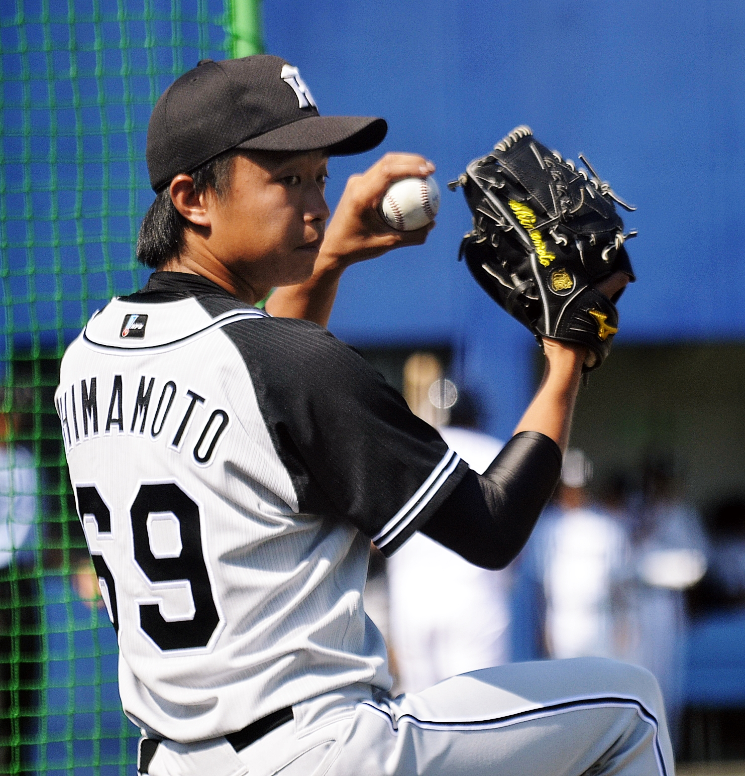 阪神タイガースの島本浩也投手